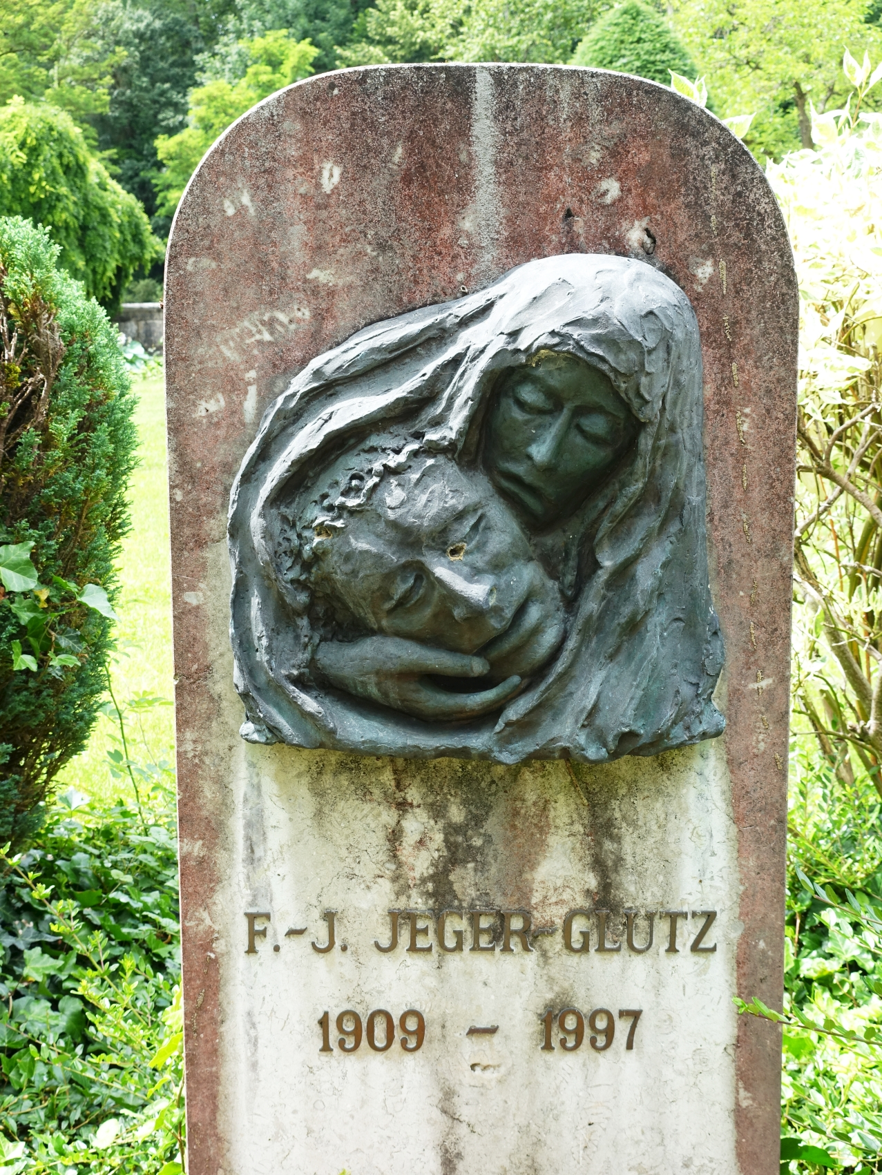 Franz Josef Jeger (1909–1997) Jurist, Politiker. Grab. Kirche St. Niklaus, Friedhof Feldbrunnen-St. Niklaus, Solothurn.